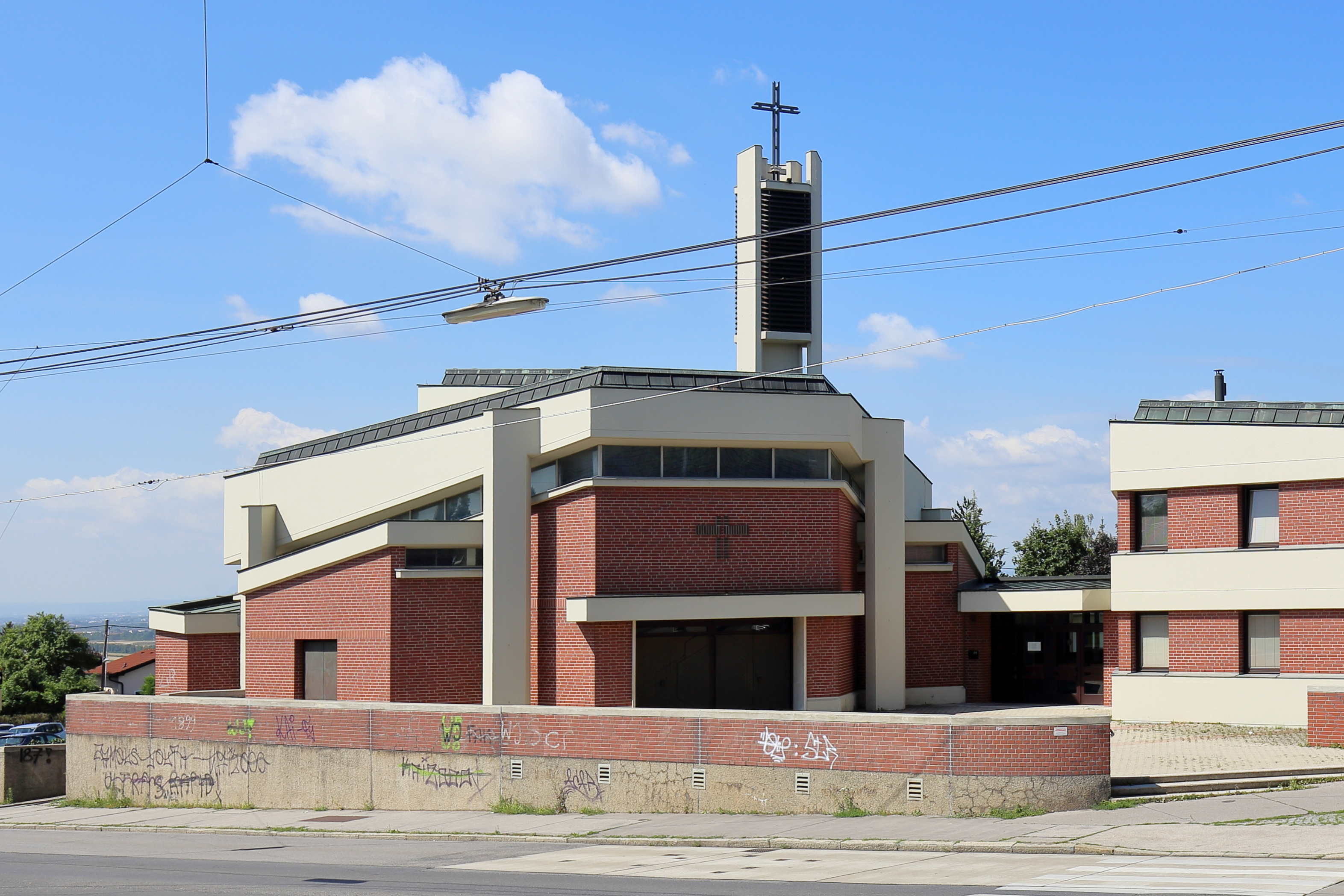 Nordostansicht der Kirche Zum Heiligen Kreuz am Laaer Berg an der Adresse Laaer-Berg-Straße 222 im 10. Wiener Gemeindebezirk Favoriten. Die Kirche mit einem ungleichschenkeligen sechseckigen Grundriss und freistehendem Kirchturm sowie das nördlich anschließende Pfarrhaus wurde nach Plänen des Architekten Herbert Schmid gegenüber dem Kurpark Oberlaa auf einer Anhöhe errichtet und 1986 geweiht.Das moderne Gesamtkunstwerk wurde in Anspielung auf die früher dominante Ziegelerzeugung in dieser Gegend in Sichtziegelbauweise ausgeführt.